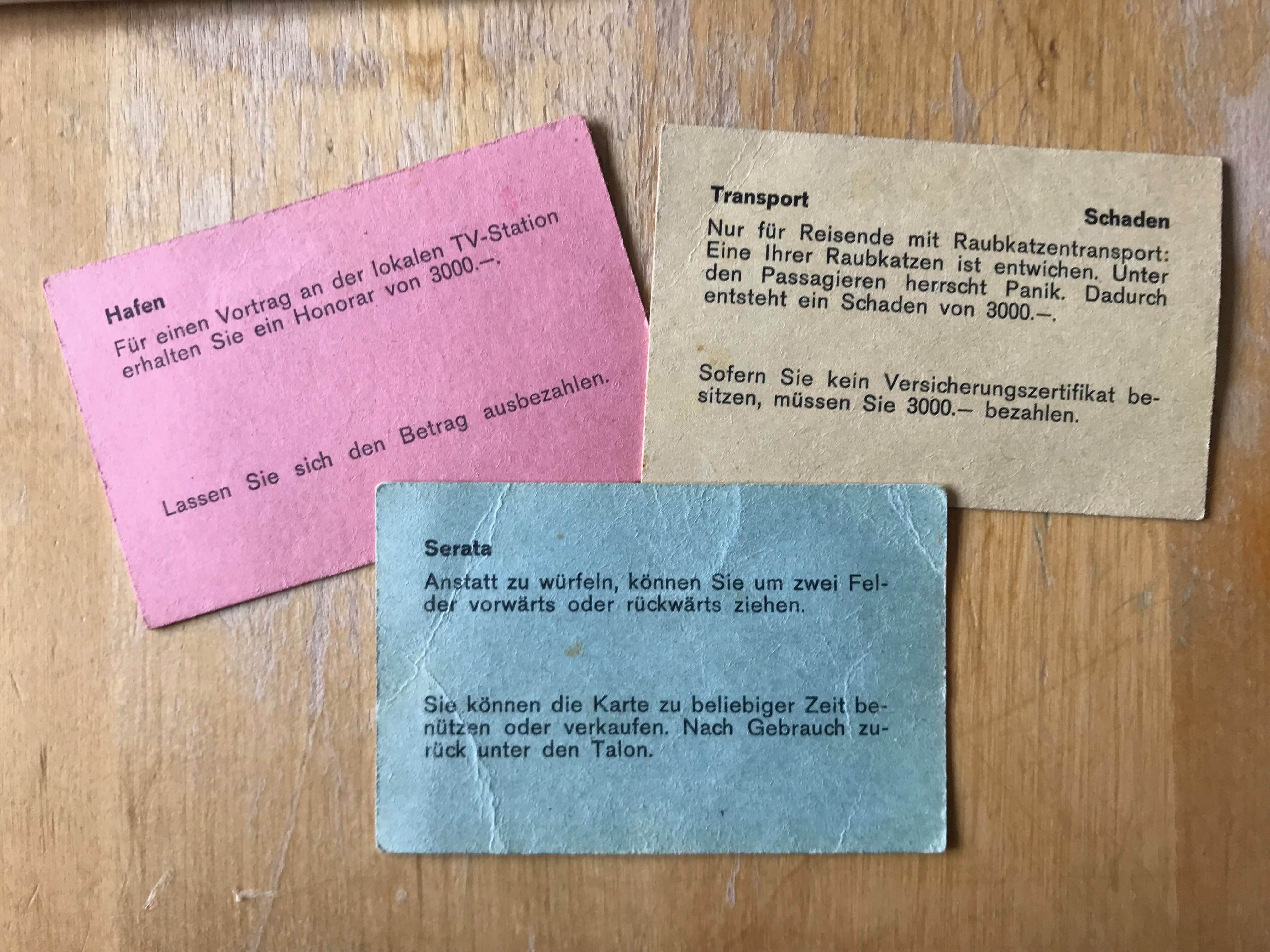 Spielmaterial des Spiels Wild Life, Ravensburger um 1965